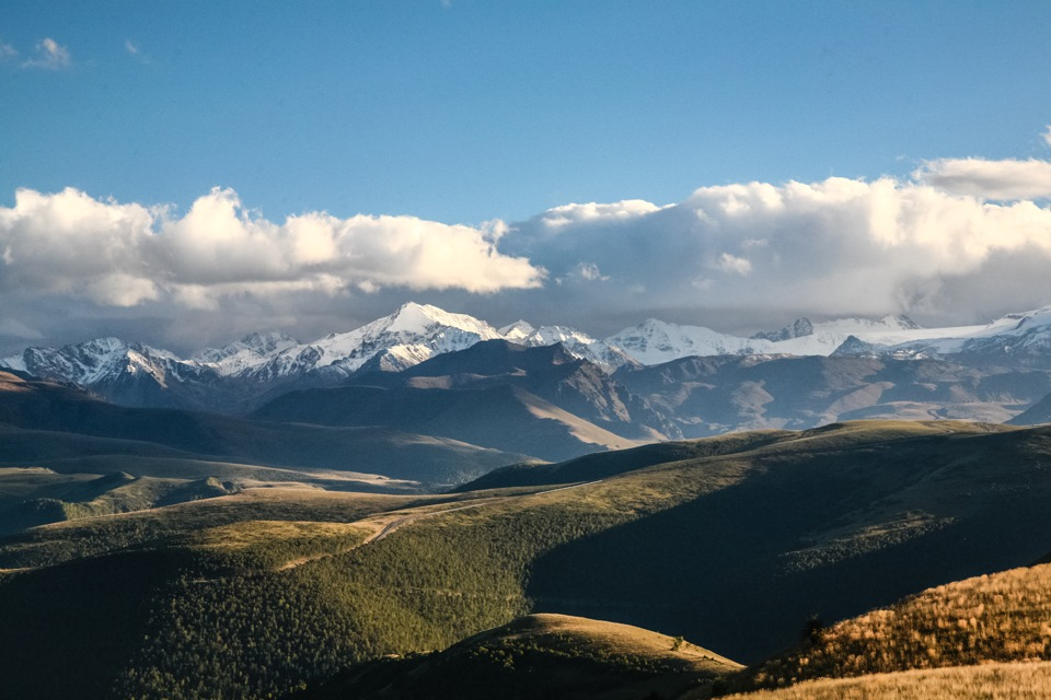 Приэльбрусье, Зольский район This image is related to the protected area of Russia number 0700010